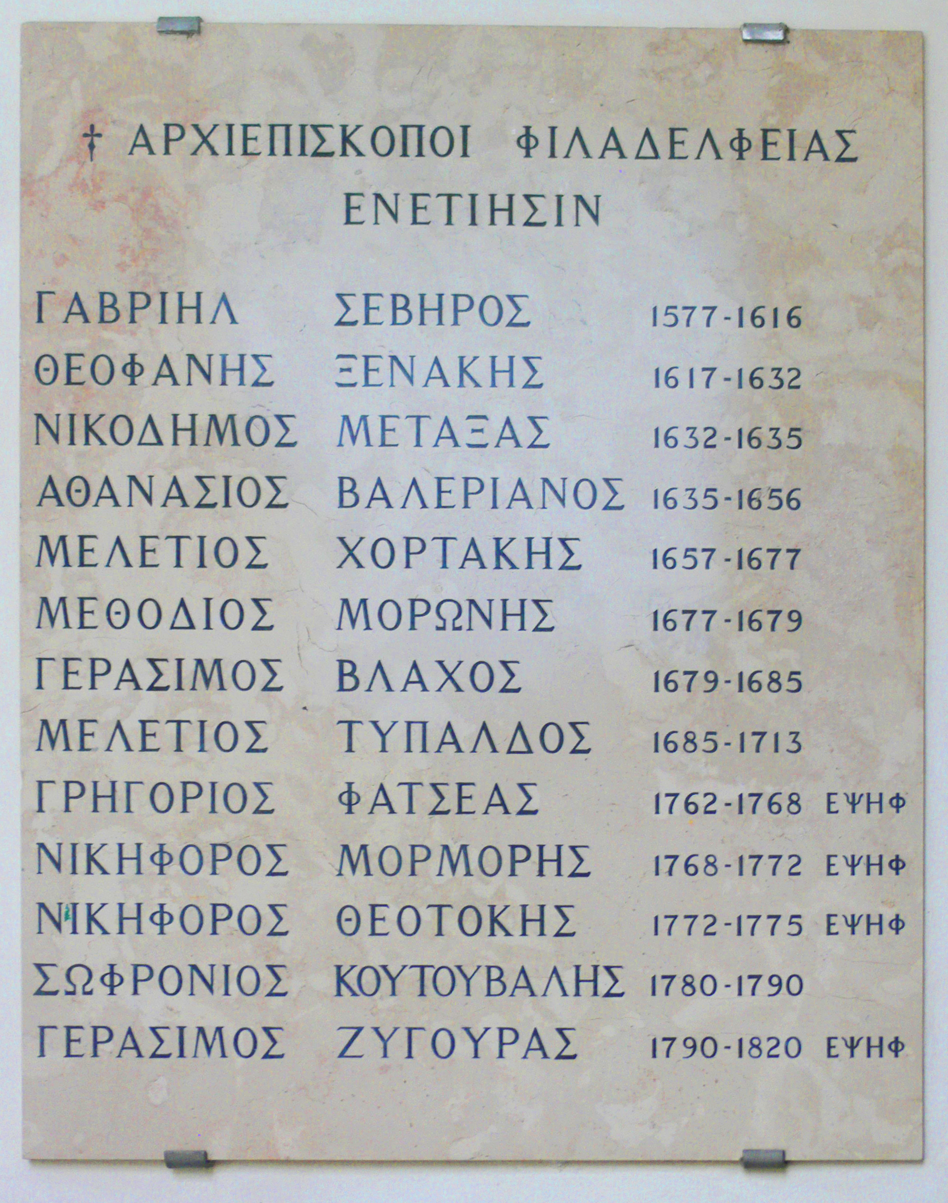 Listes des archevêque de l'archevêché orthodoxe grec d'Italie, ayant son siège à San Giorgio dei Greci (Venise)